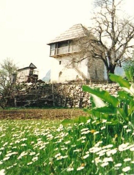 Kullë tipike Dukagjinse 300-vjeçare në Abat